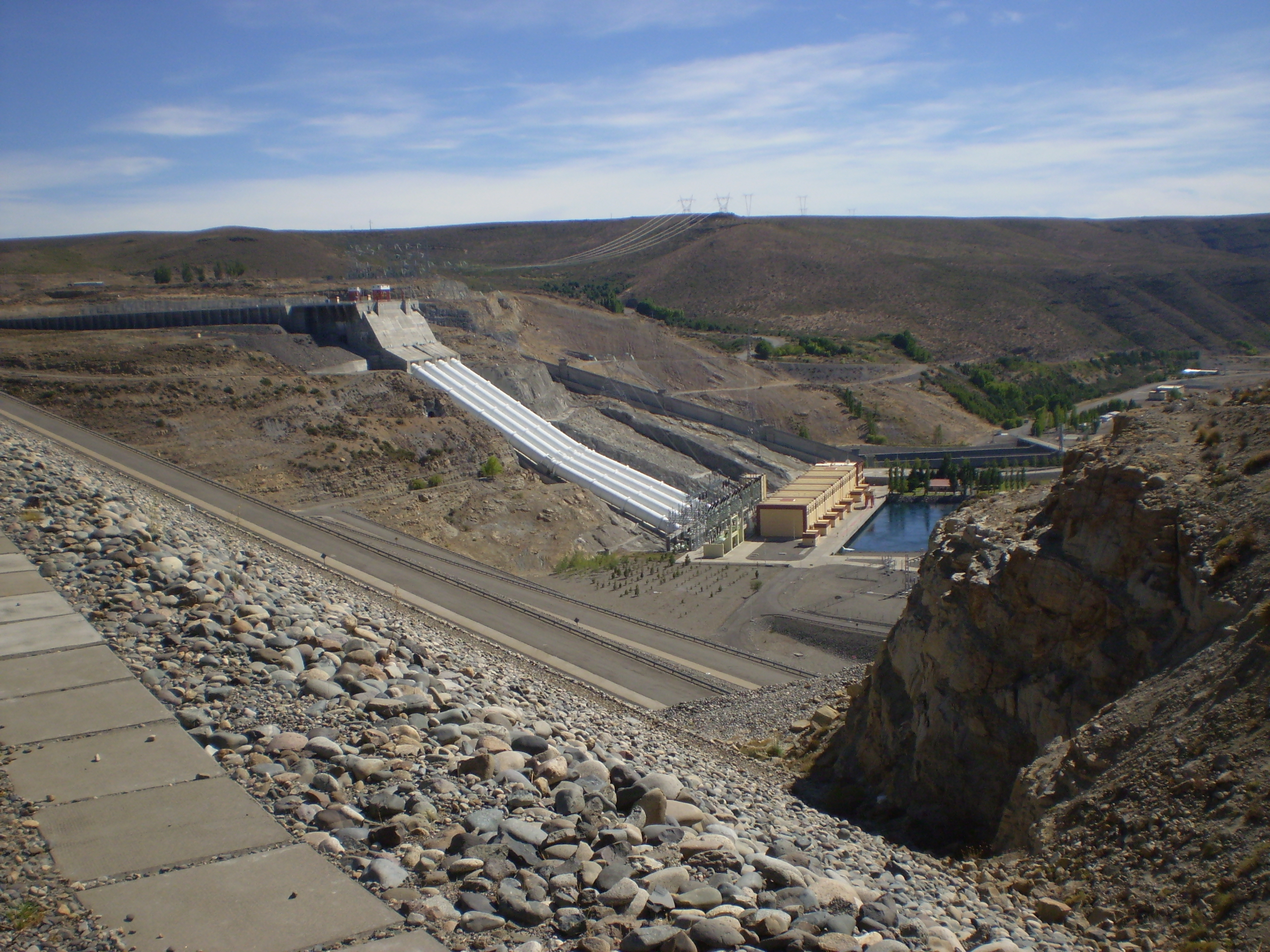 Represa de Alicurá, sobre el río Limay, Argentina